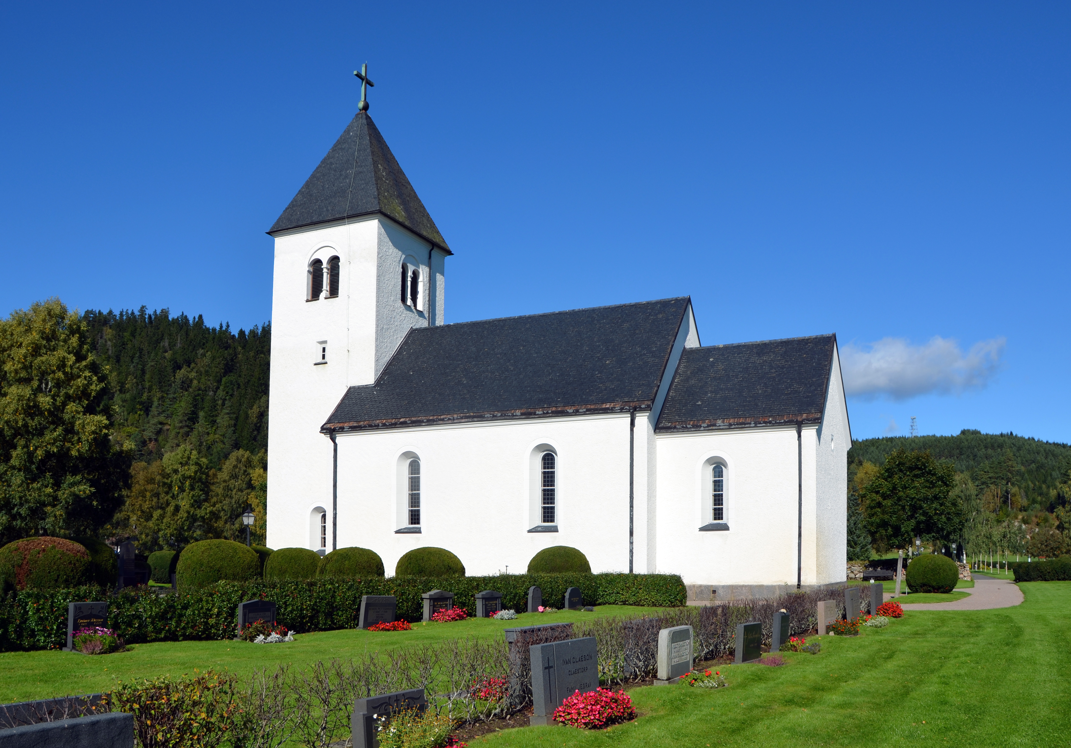 Kirche von Vist, Skara Stift, Nordwestlich von Ulricehamn